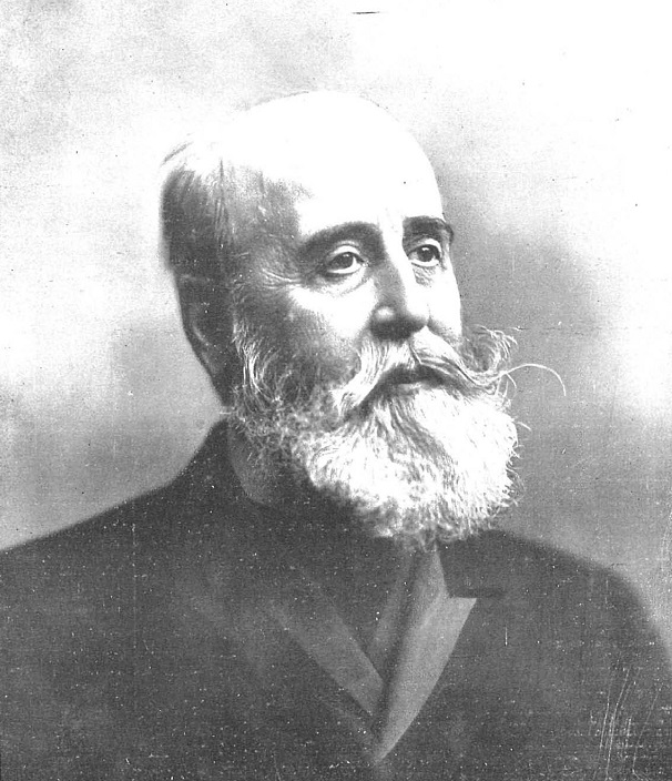 Retrato de Segismundo Moret, fotografiado por Kaulak y recogido en la revista española Nuevo Mundo.